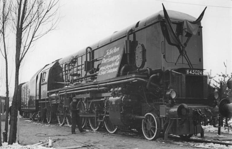 Kohlenstaublok H45 024 Illus Quaschinsky Gr-Nü 3.3.51 Leipziger Frühjahrsmesse vom 4. - 11-3-51. UBz: Kohlenstaublok.